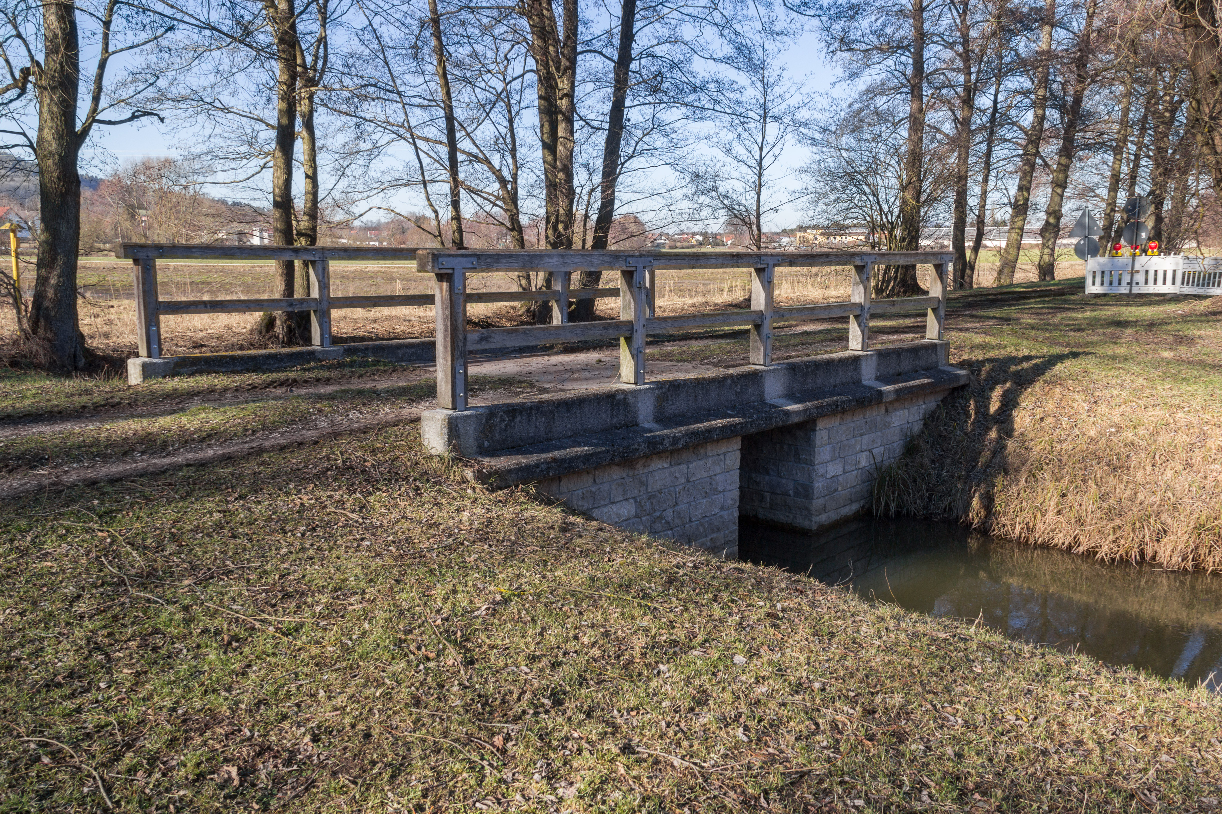 Ludwig-Donau-Main-Kanal, Bacheinleitung, Sulz